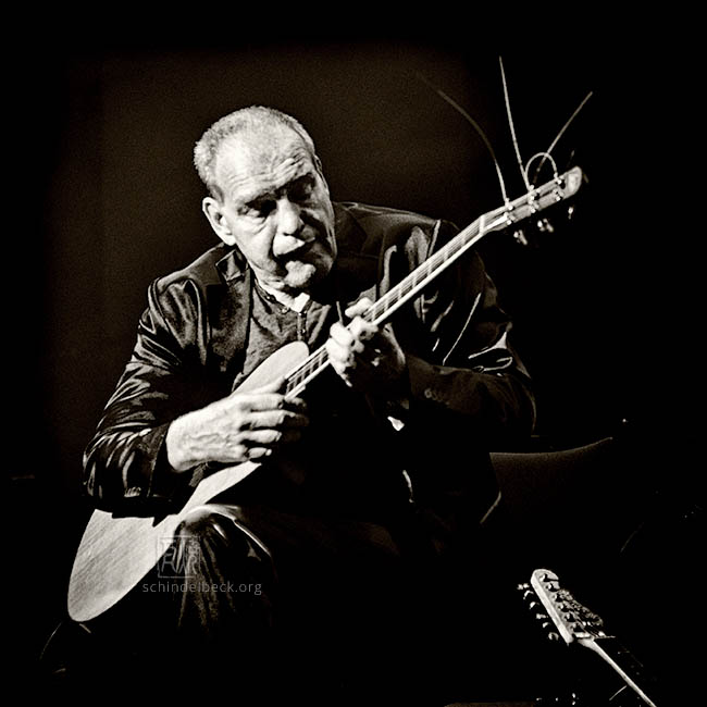 Photo des österreichischen Gitarristen Karl Ritter.